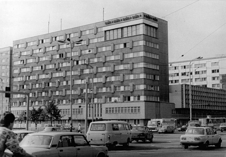 Berlin, Mollstraße, ADN-Gebäude ADN-Reiche 17.5.90 Berlin: Der Allgemeine Deutsche Nachrichtendienst - ADN - berichtet in Wort und Bild aus der DDR und aller Welt. Der Hauptsitz ist in der Mollstraße 1. Täglich werden im In- und Ausland rund 300000 Wörter verbreitet. Die Fotoabteilung Zentralbild übermittelt täglich 60 bis 75 aktuelle und historische Motive in schwarz-weiß und Farbe an Abnehmer im In- und Ausland.